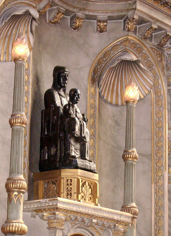 Statue de la Vierge noire - XIe siècle - Cathédrale Notre-Dame de Moulins